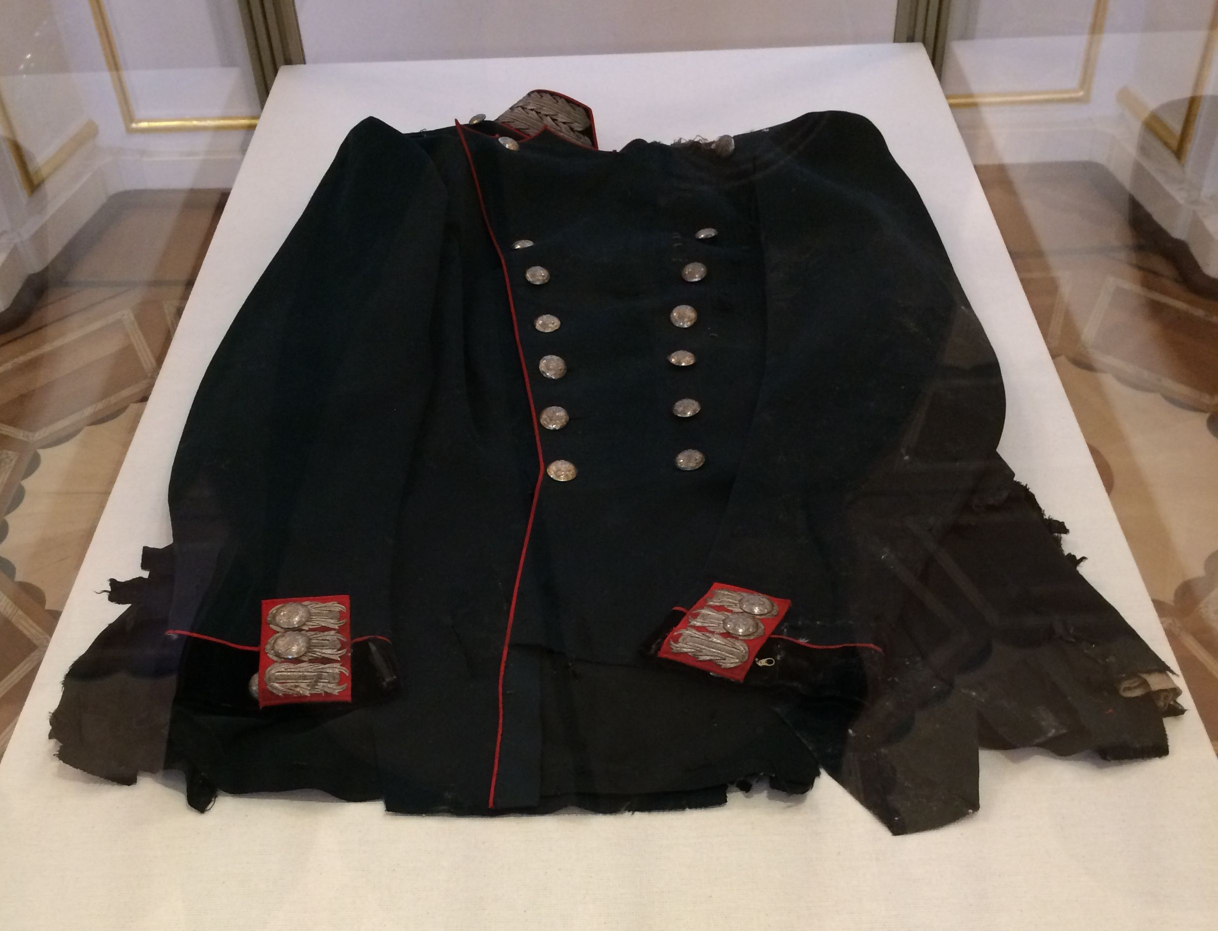 Мундир офицерский императора Александра II в котором он был убит 1 марта 1881 года (хранится в собрании Государственного Эрмитажа)